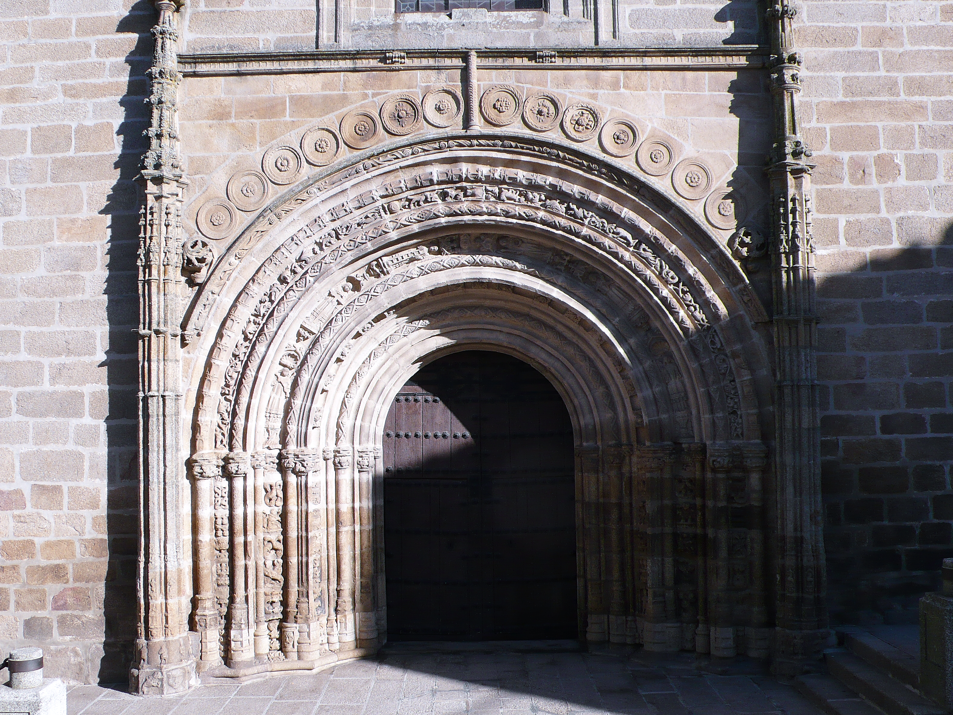 Portada de los pies. Una obra de Pedro de Ibarra (s. XVI)